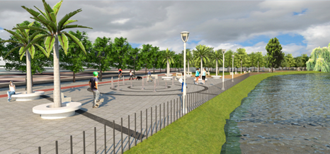 25-09-2013 Parque Piduco